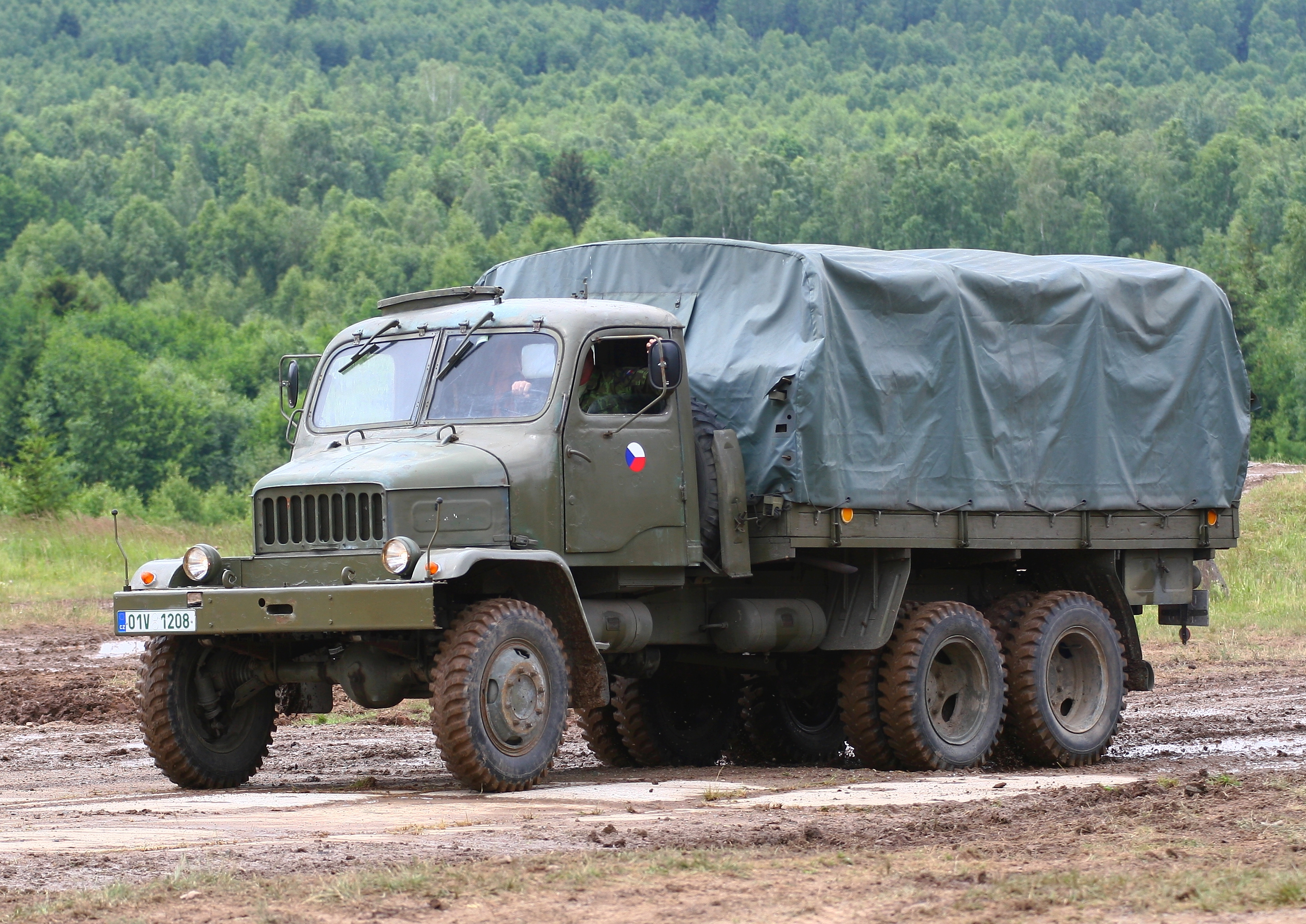 Vojenská technika zaznamenaná při dynamických ukázkách na Dni pozemního vojska BAHNA 2018, který pořádá Velitel společných sil a Nadace pozemního vojska AČR.